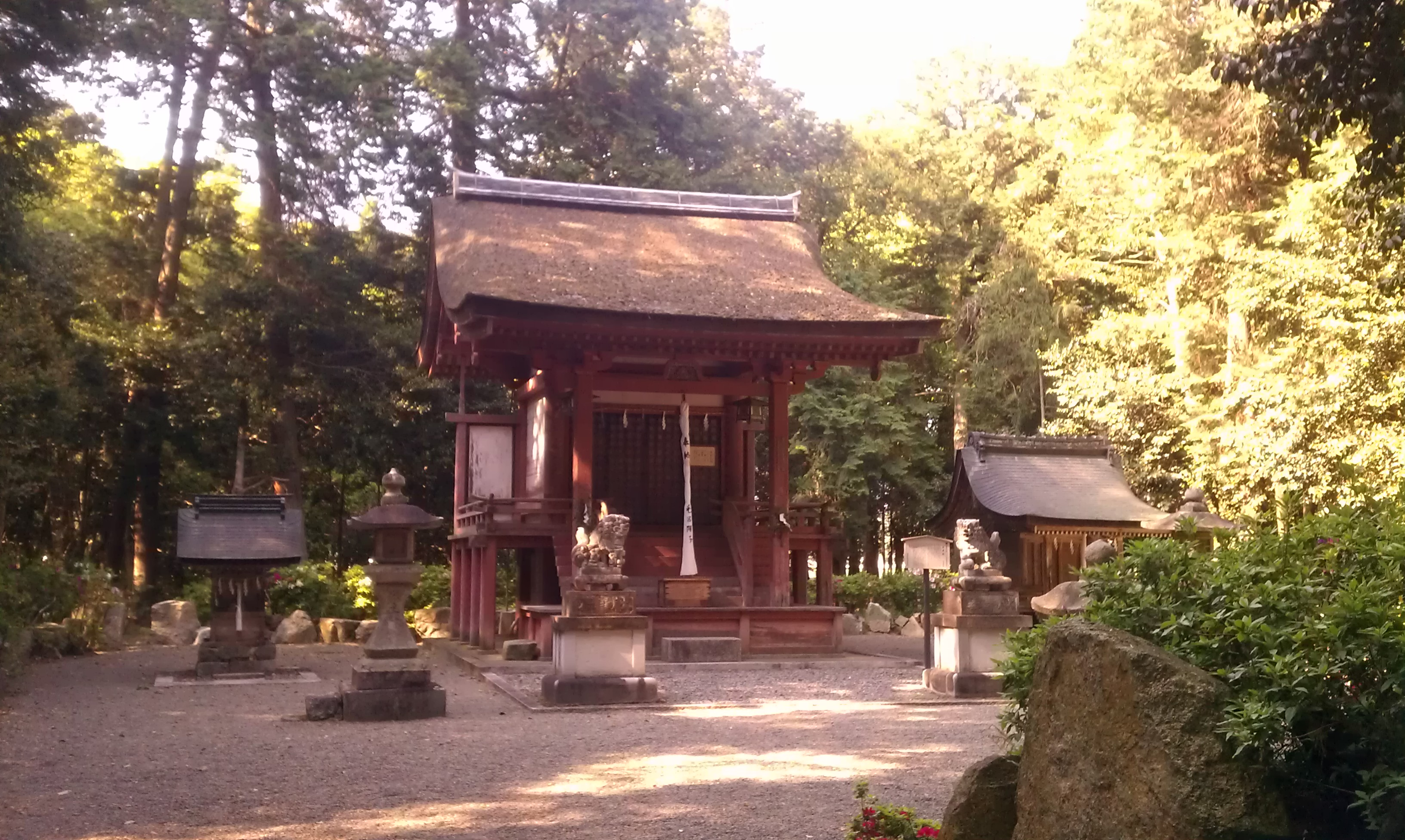 苗村神社 東本殿